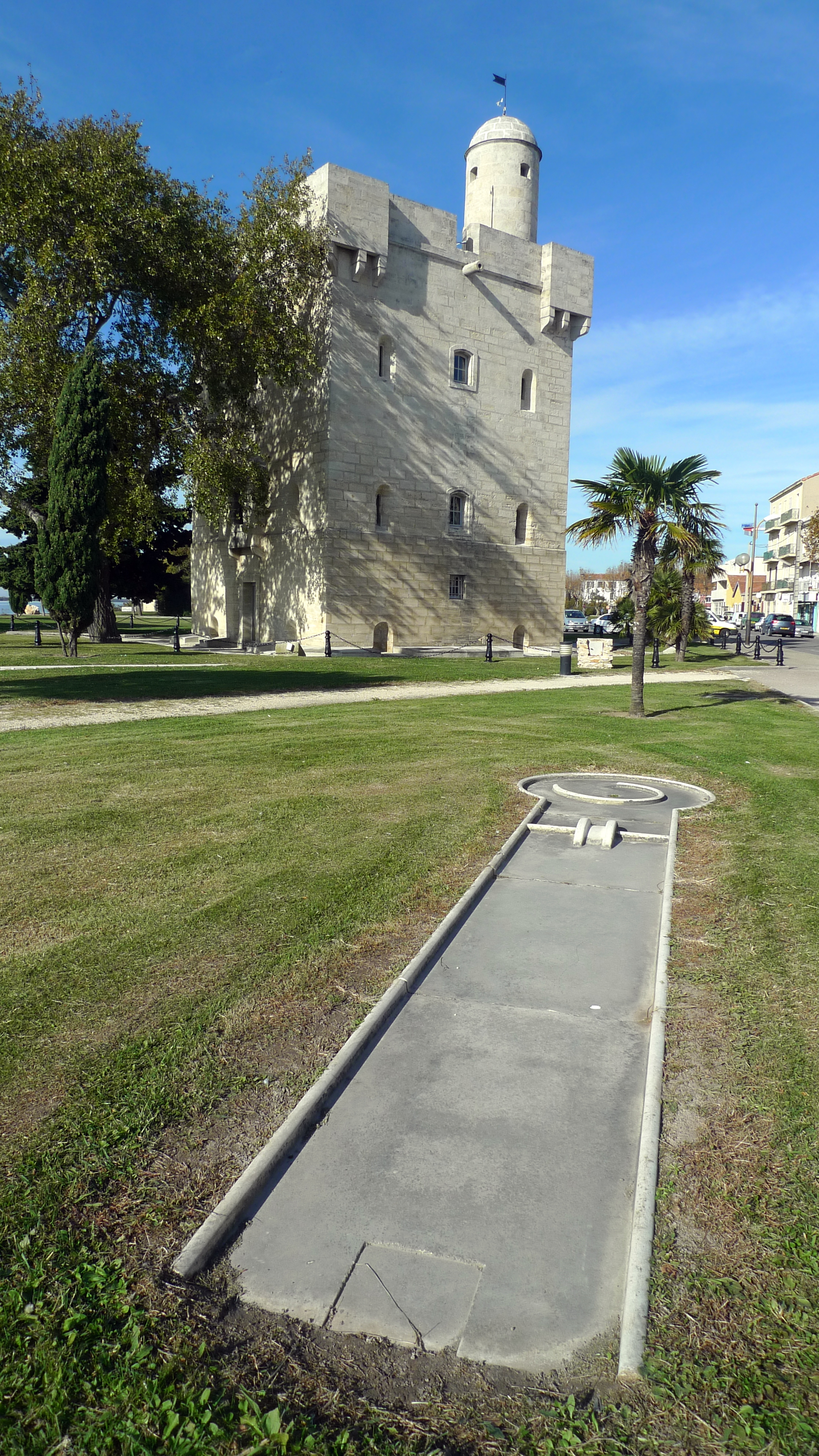 Tour de Saint-Louis, siège de l'office de tourisme, et mini-golf